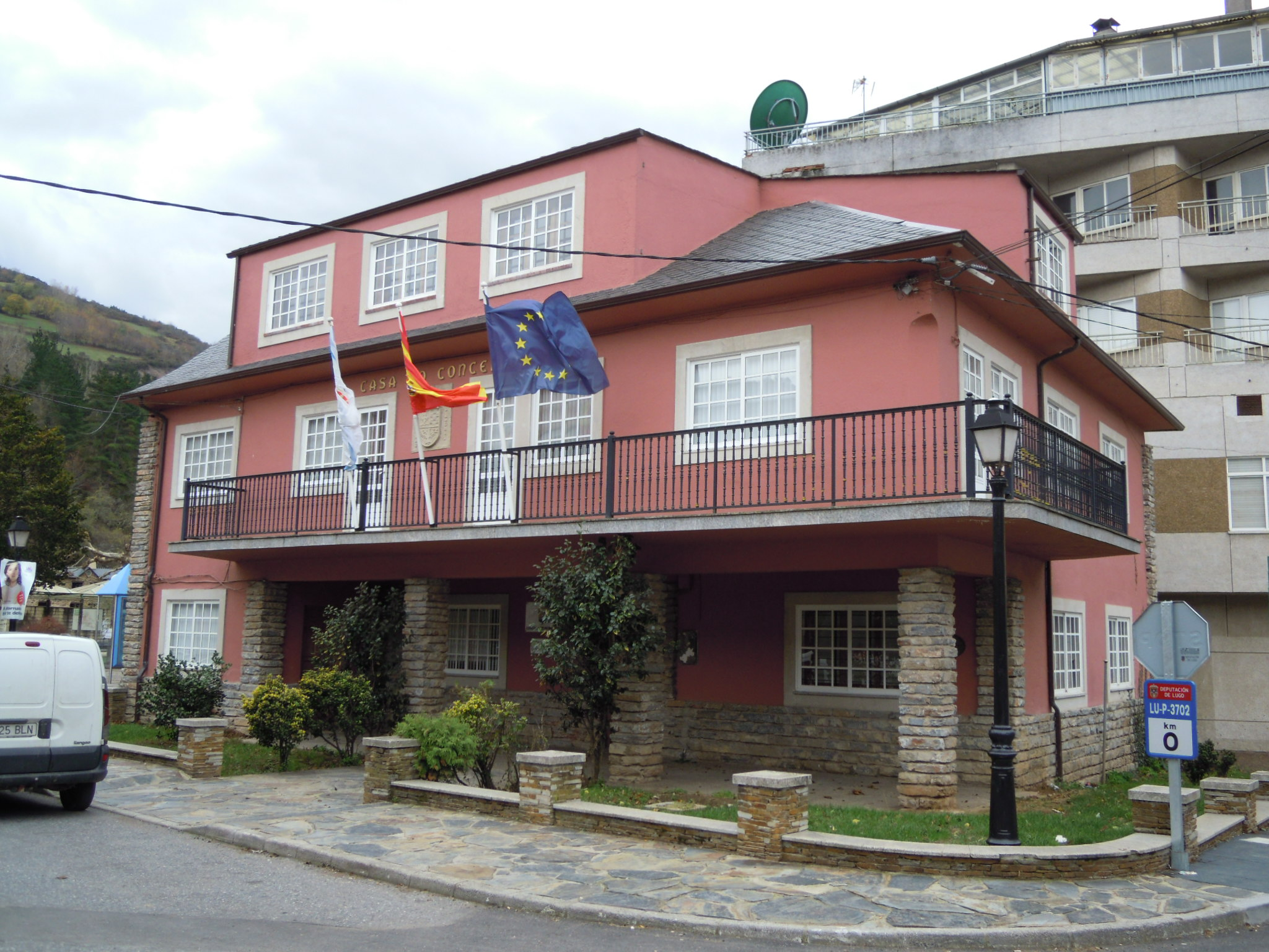 Casa consistorial das Nogais